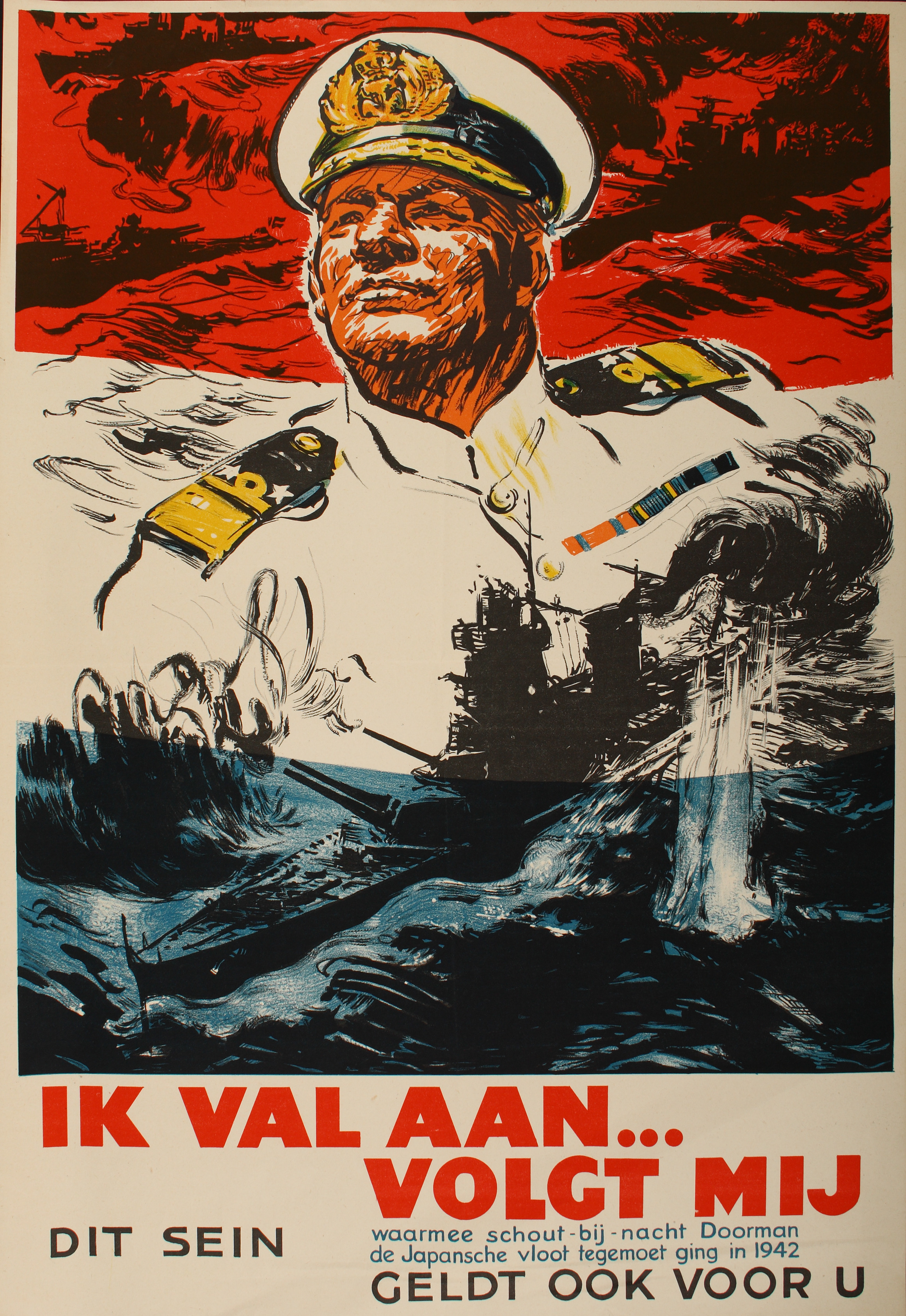 Ik val aan ... volgt mij Affiche, waarschijnlijk tot stand gekomen na de capitulatie van de Duitsers in 1945 maar voor de overwinning op Japan. Als decor de driekleur om op de voorgrond het schip en de beeltenis van Karel Doorman duidelijk naar voren te laten komen. Het biljet roept op om gehoor te geven aan de oproep om mee te vechten met de geallieerden tegen de Japanners, zoals Karel Doorman dat deed in 1942.